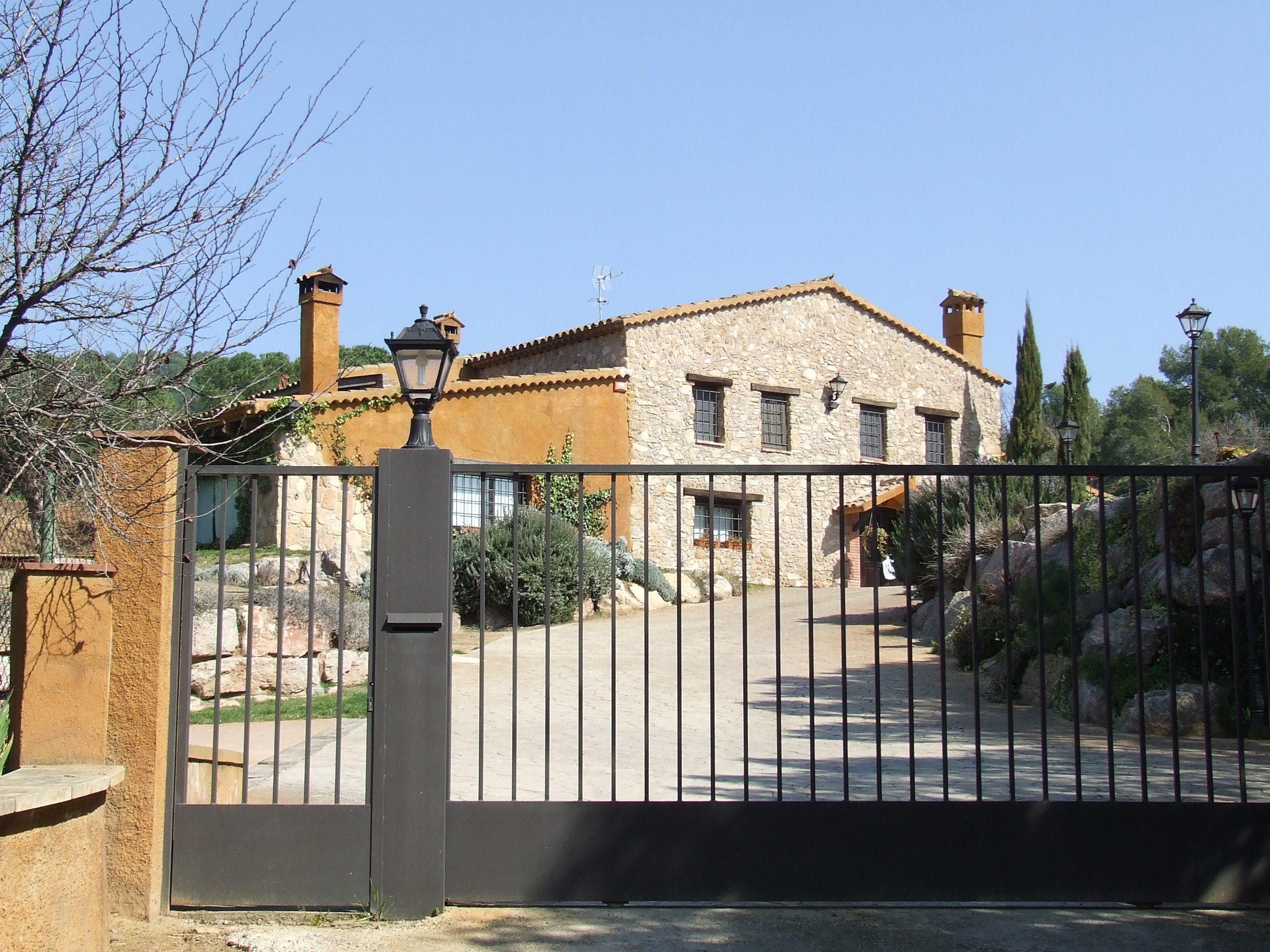 Can Pere Pau (Bigues, Bigues i Riells, Vallès Oriental)